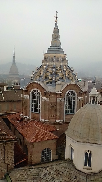 La Cappella della Sacra Sindone vista dalla torre campanaria del Duomo di Torino. L'immagine è successiva al restauro ultimato nel settembre 2018. Sullo sfondo, la Mole antonelliana.